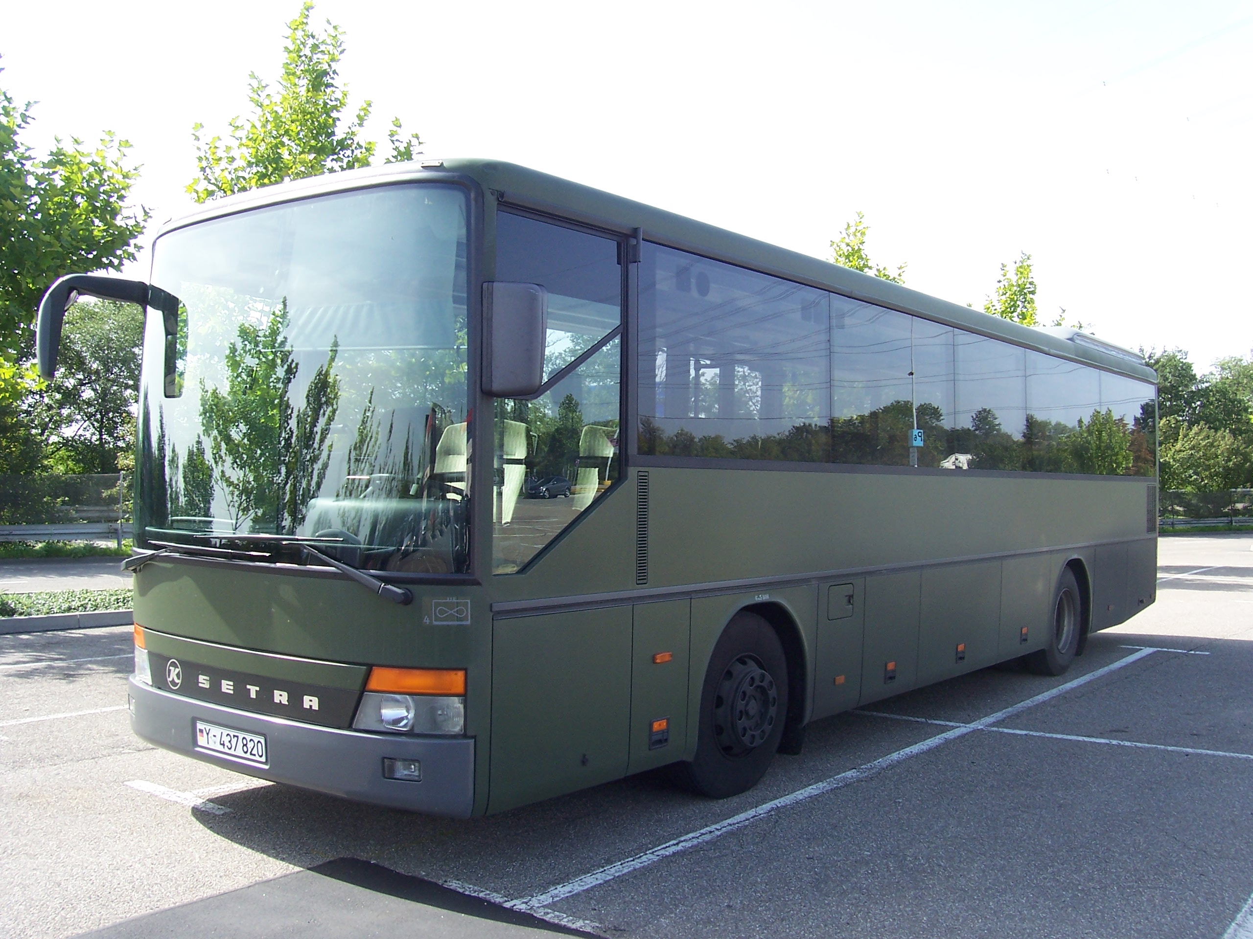 Ein Setra S 313 UL der Bundeswehr in Viernheim